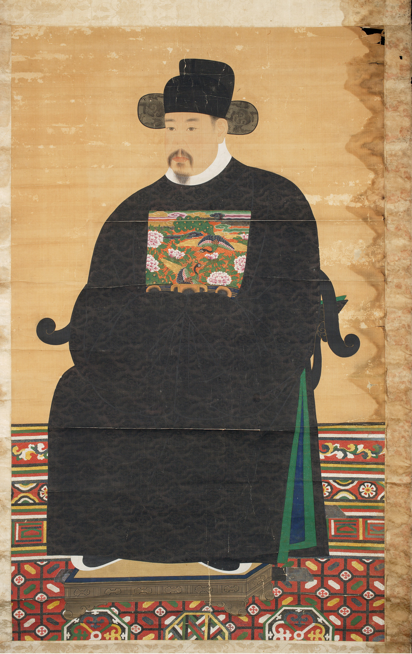 조선 중기의 문신 대원군 윤효전의 초상화